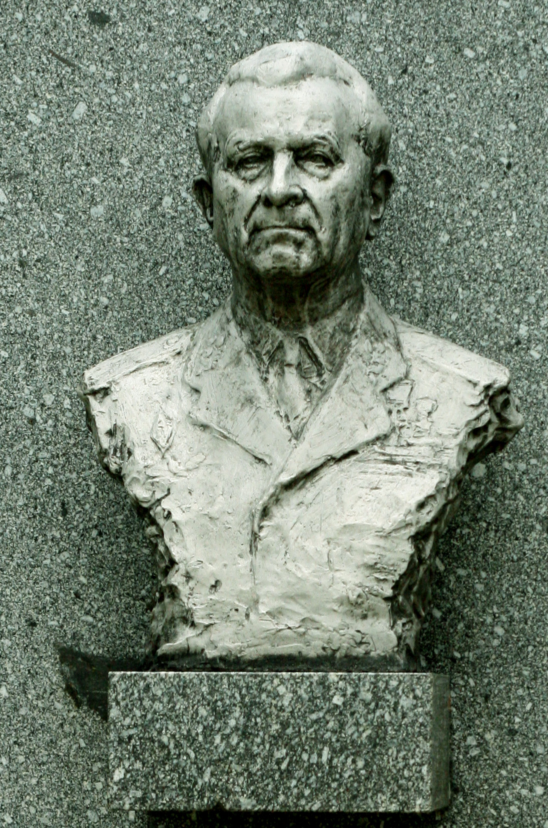 Dukla, Alej hrdinov armádny generál Ludvík Svoboda